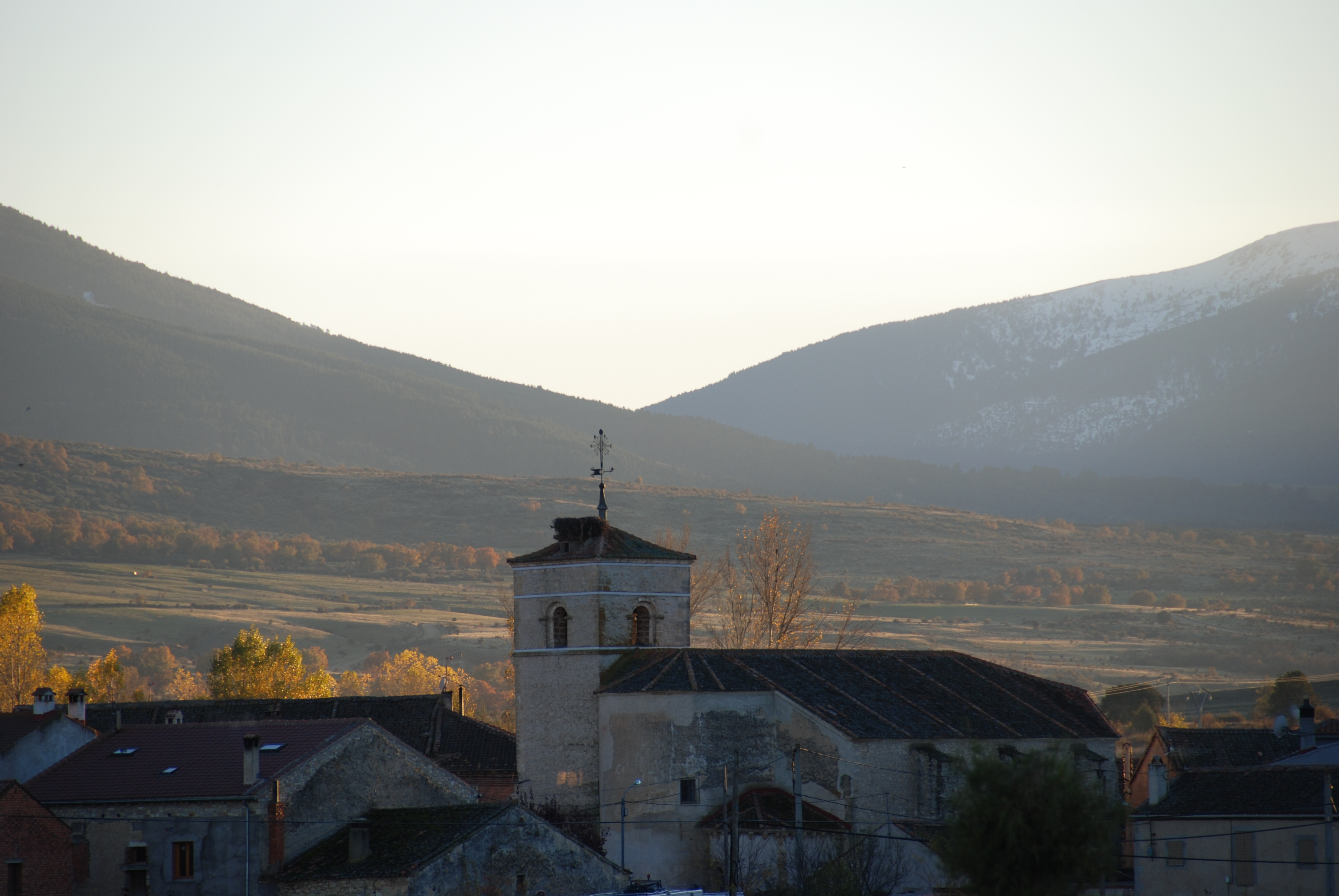 Vista de la iglesia de Arcones desde el camino a Huerta.